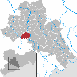 Lichtenau in Saxony - district Mittelsachsen